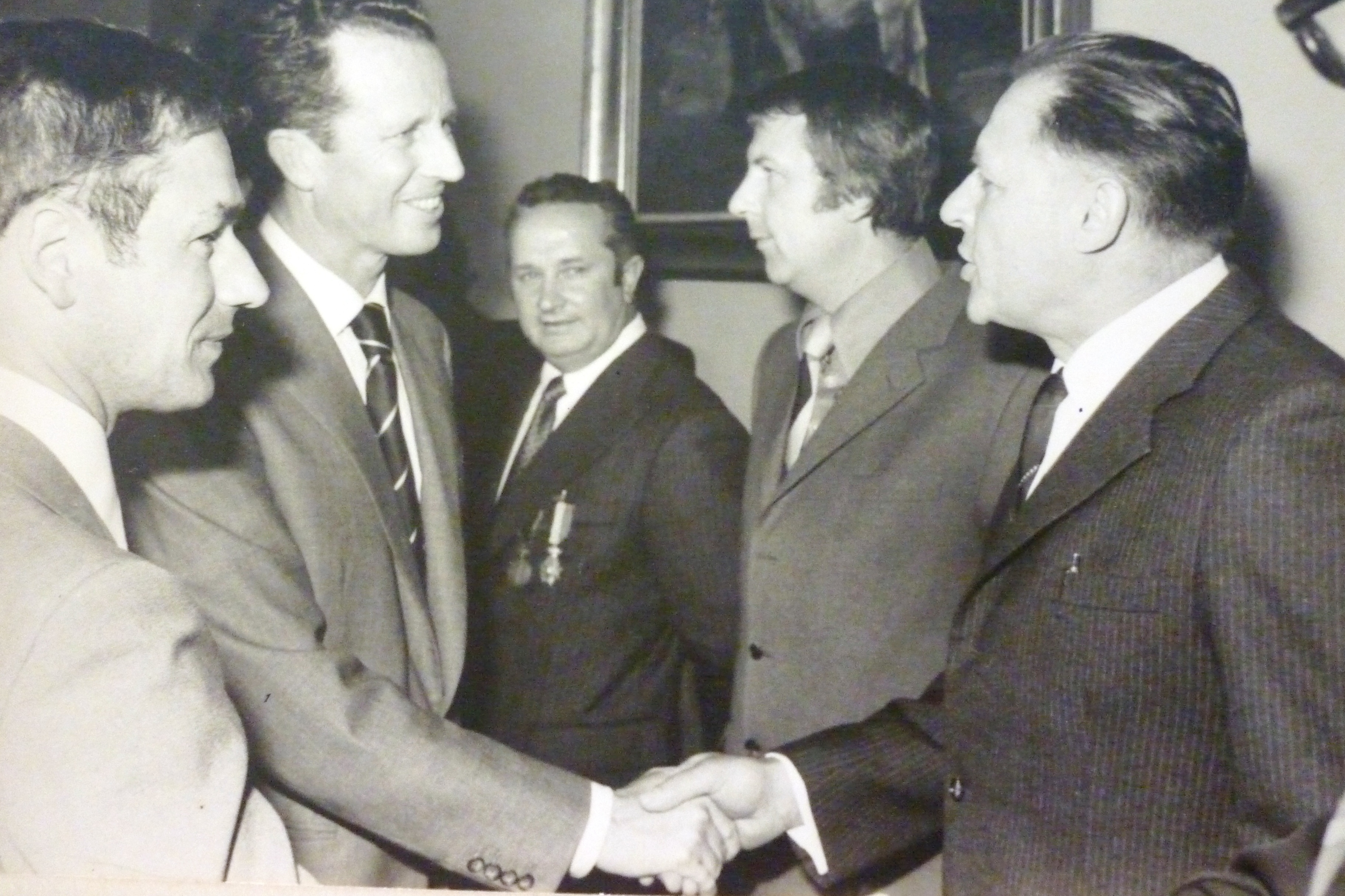 Foto van het Koninklijk bezoek aan Maldegem in 1974, Gerard Storm ontmoette Koning Boudewijn op het gemeentehuis tijdens de officiële plechtigheid.